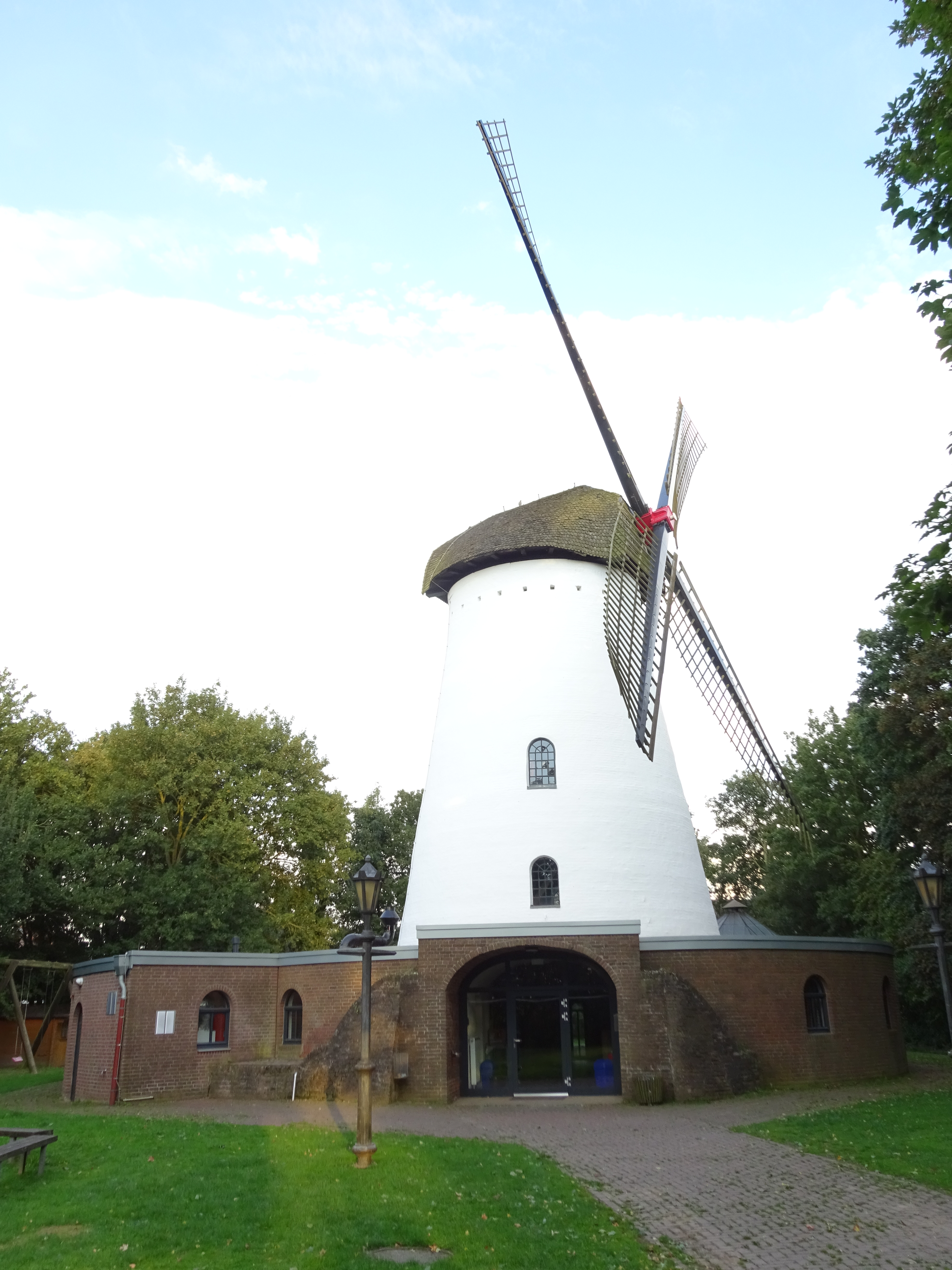 Wisseler Mühle in Kalkar-Wissel. Gebouwd rond 1873 door het echtpaar Paal. Was in gebruik tot vernieling kort voor het einde van WO2. In 1966 herbouwd waarbij de molenheuvel door een ronde aanbouw werd vervangen. Mühle Wissel is in gebruik als jeugdherberg voor groepen. This is a photograph of an architectural monument.